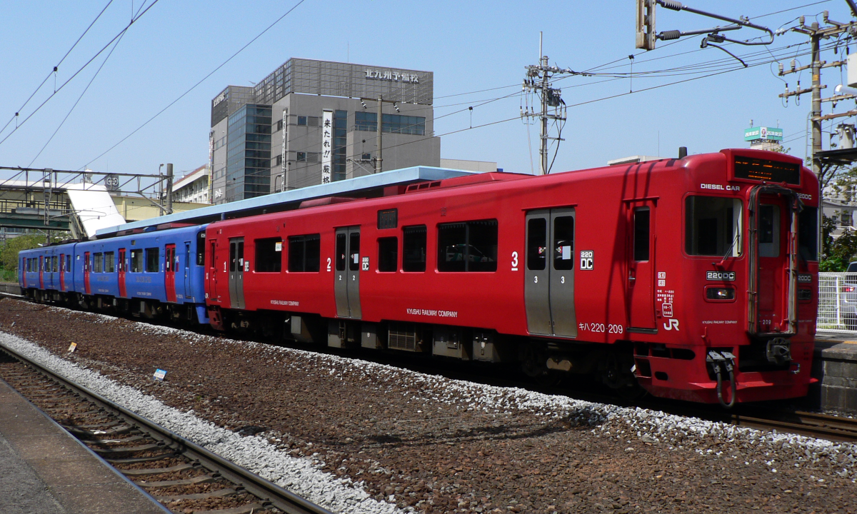 JR九州 キハ220 209 (赤色) と キハ200 6+1006 （シーサイドライナー色) の3両編成。浦上駅にて撮影。